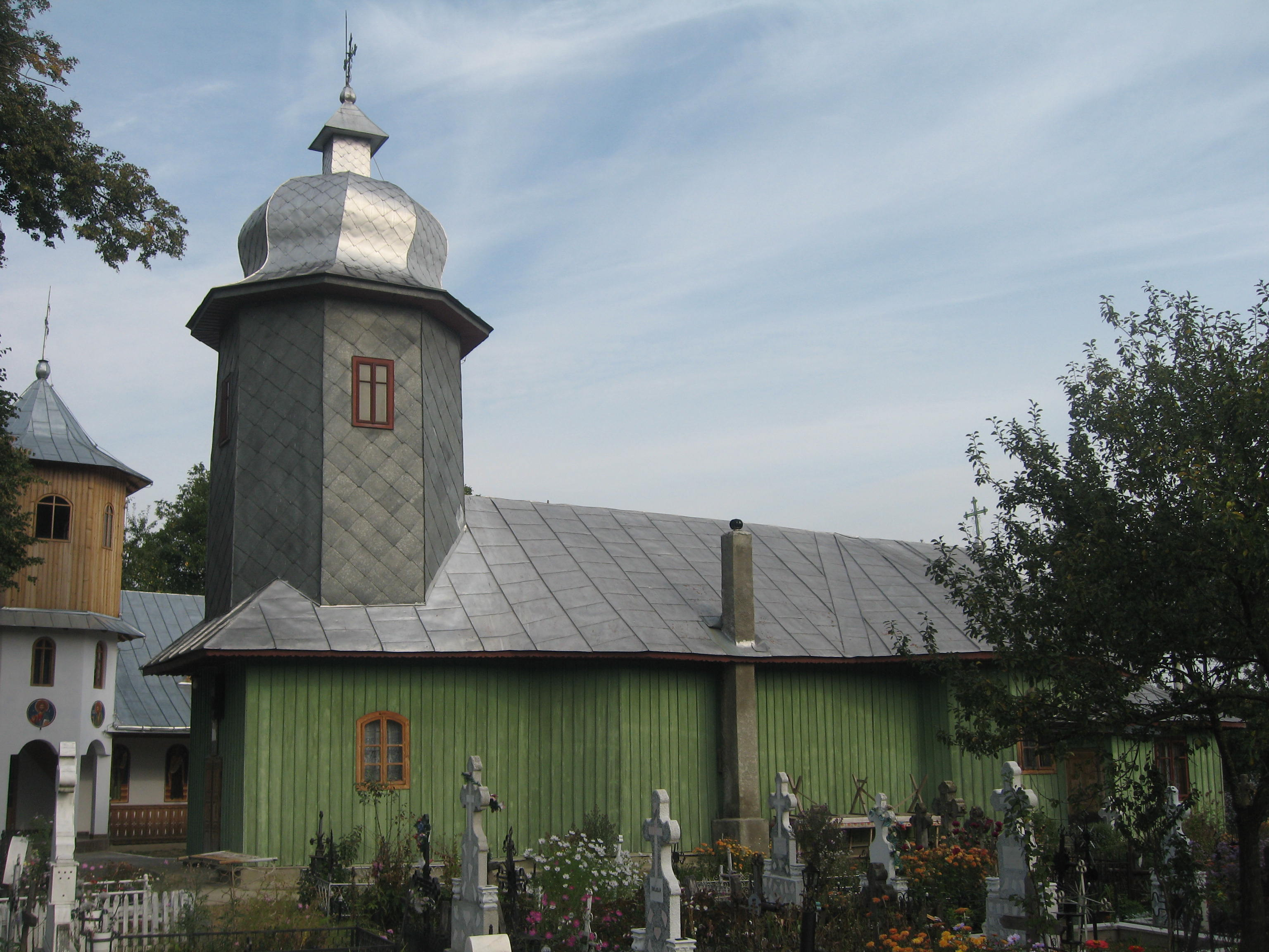 Biserica de lemn Sfinţii Voievozi din Bogdăneşti, Suceava